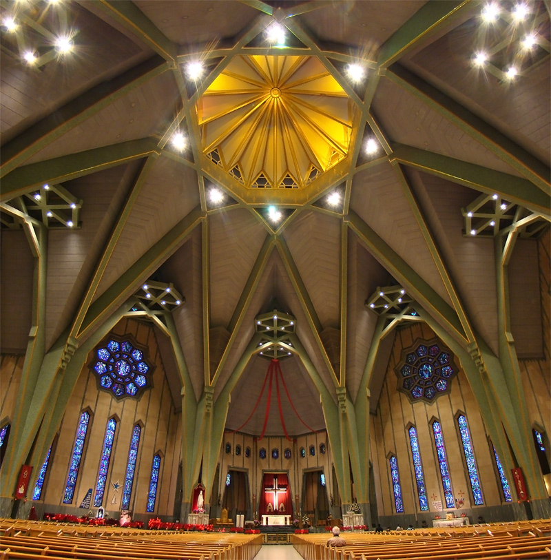 Basilique Notre-Dame-du-Cap, Trois-Rivières, Mauricie, Québec, Canada.